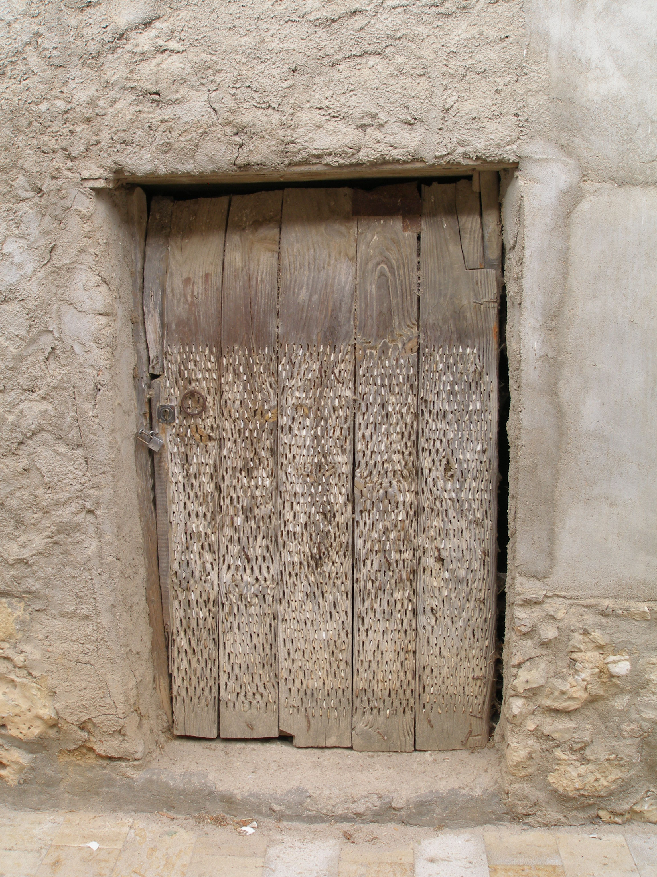 Trillo utilizado como puerta en Urueña (Valladolid), foto hecha por mi